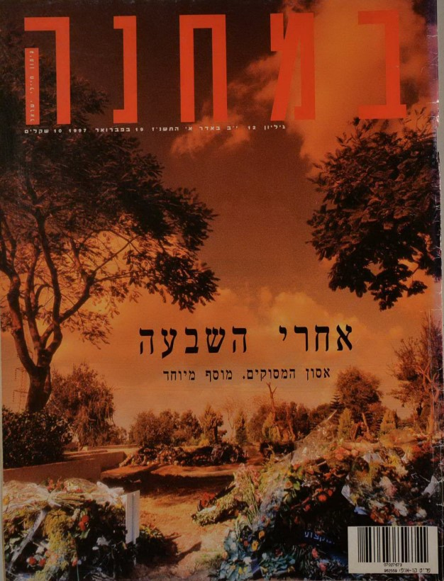 שער גליון במחנה לאחר אסון המסוקים